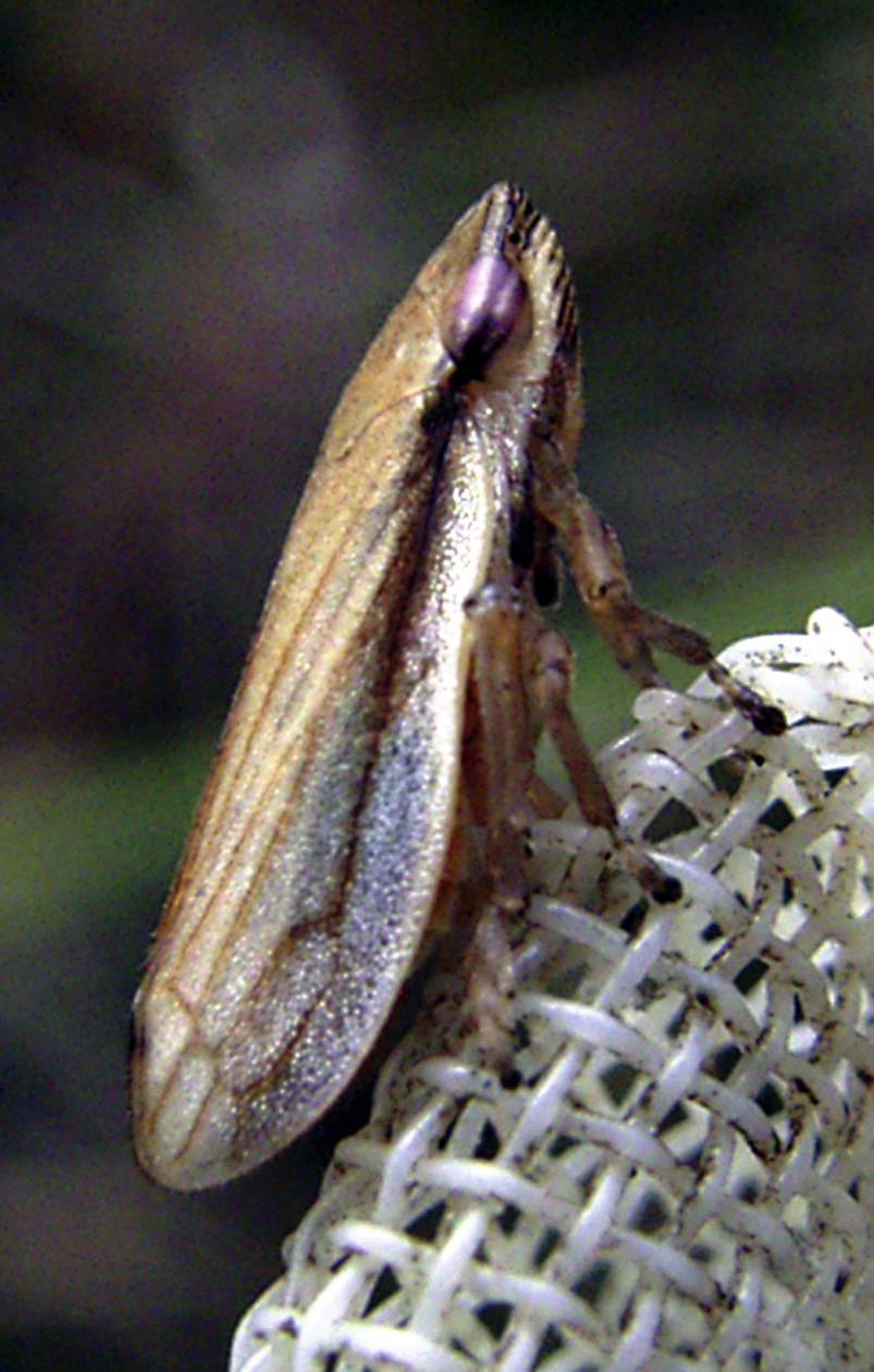 Grasschaumzikade (Neophilaenus lineatus f. typica), Nordwestdeutschland